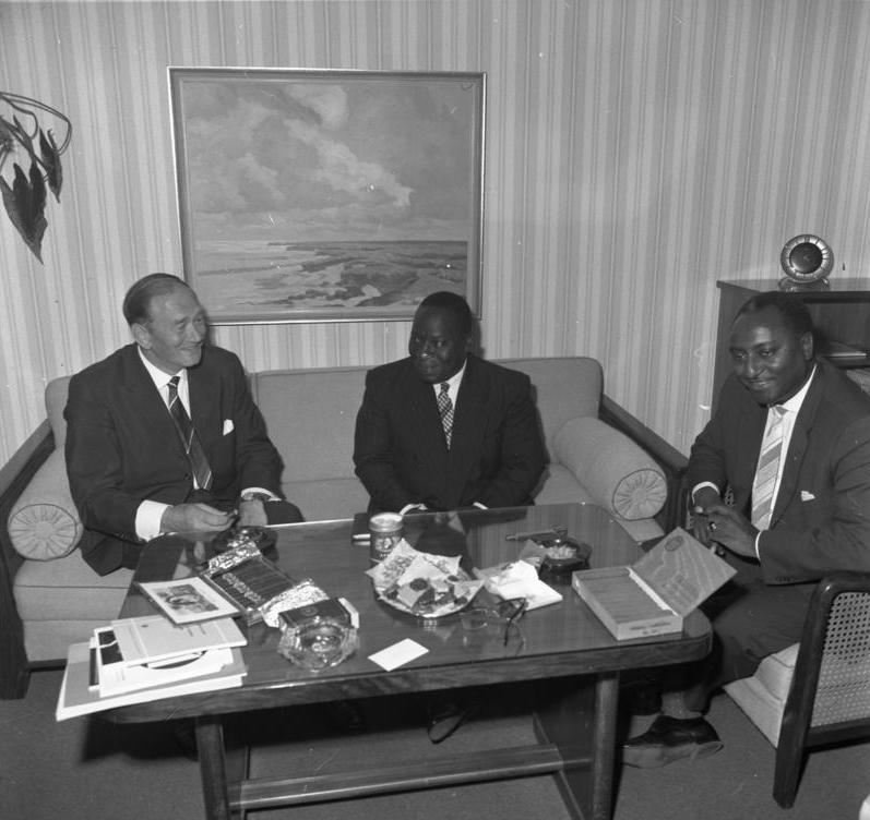 Minister für Verkehr, Post u. Fernmeldewesen Paul Amegee aus Togo bei Staatss. Claussen im Arbeitsministerium